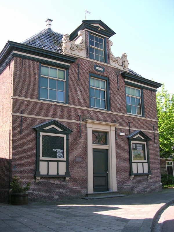 Het voormalige stadhuis van Hem en voormalige gemeentehuis van de gemeente Venhuizen, gebouwd in 1662. Former city hall of Hem and Venhuizen in Venhuizen, bild in 1662.